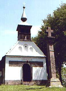 Csíksomlyó 03